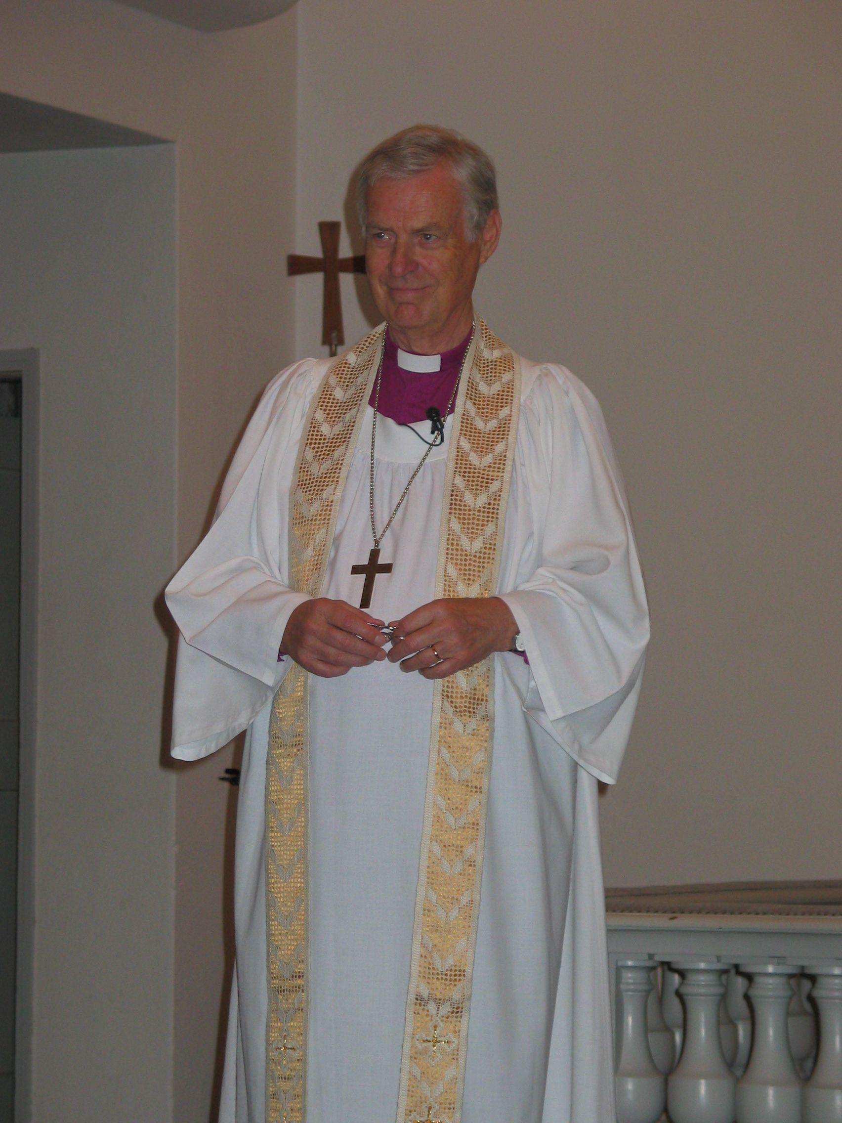 Henrik Svenungsson, bishop emeritus (Stockholm, Sweden)